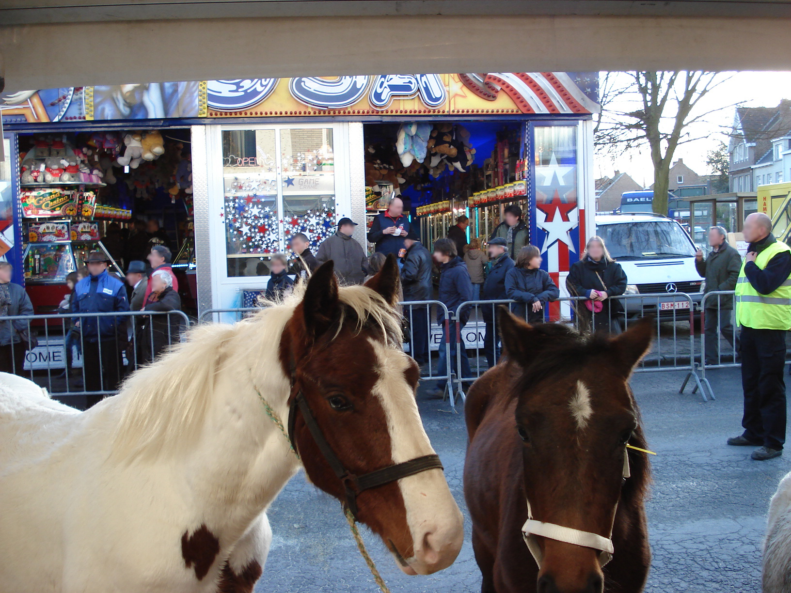 Sint-Lievens-Houtem (prov. Oost-Vlaanderen, België). Jaarmarkt 2008, sfeerbeeld.